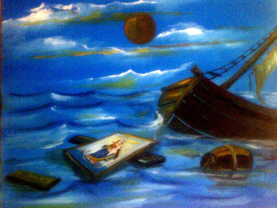 Invención del cuadro de la Virgen del Amparo,Oleo sobre tela